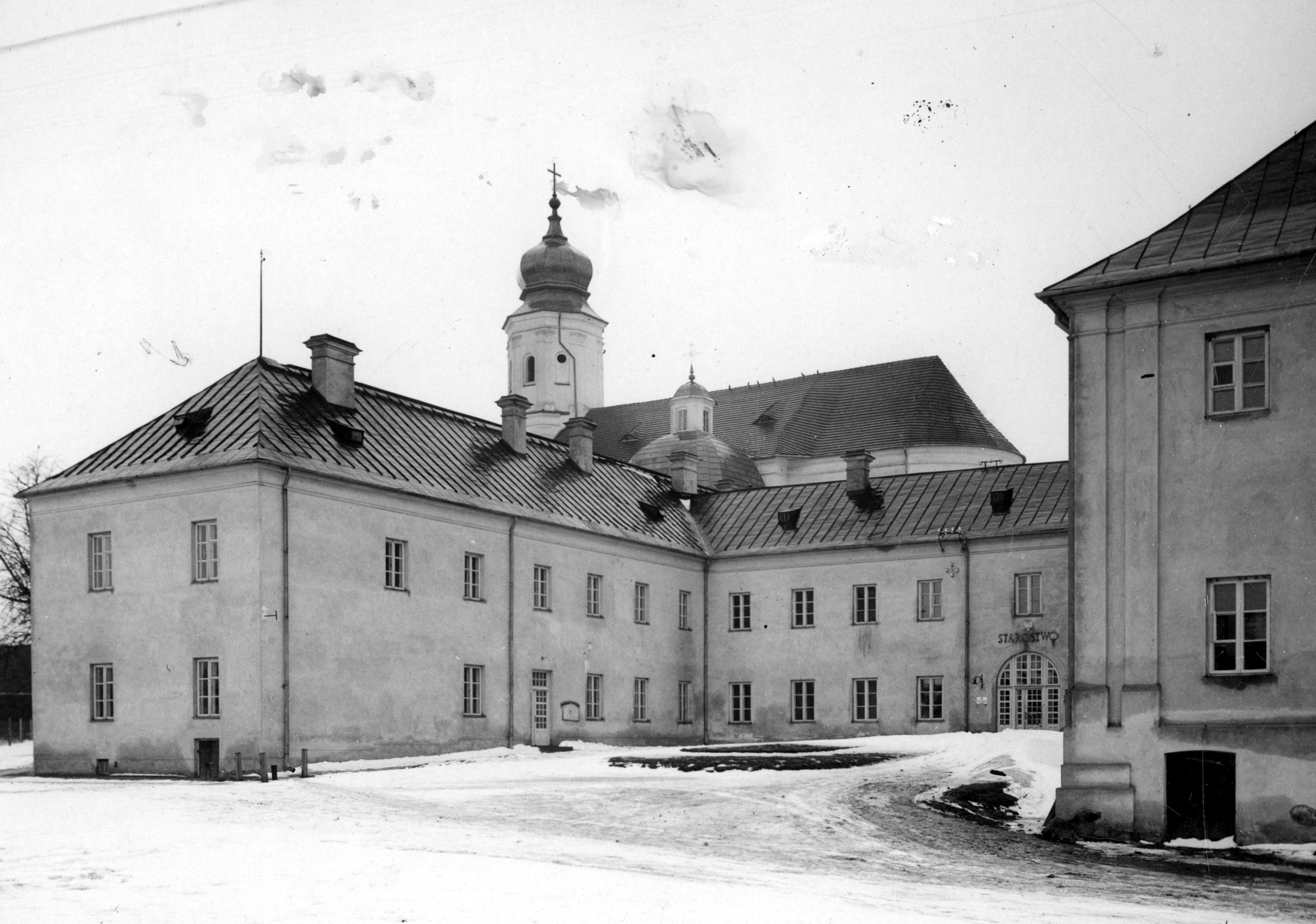 Беларуская (тарашкевіца): Слонім (Słonim), вуліца Бэрнардынская (vulica Bernardynskaja). Касьцёл Найсьвяцейшай Тройцы і кляштар бэрнардынаў